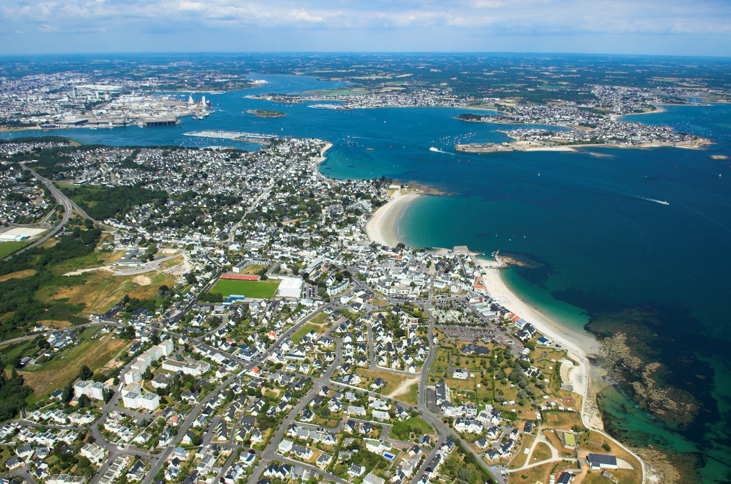 Vue aérienne de Larmor-Plage 56260 avec la rade de Lorient